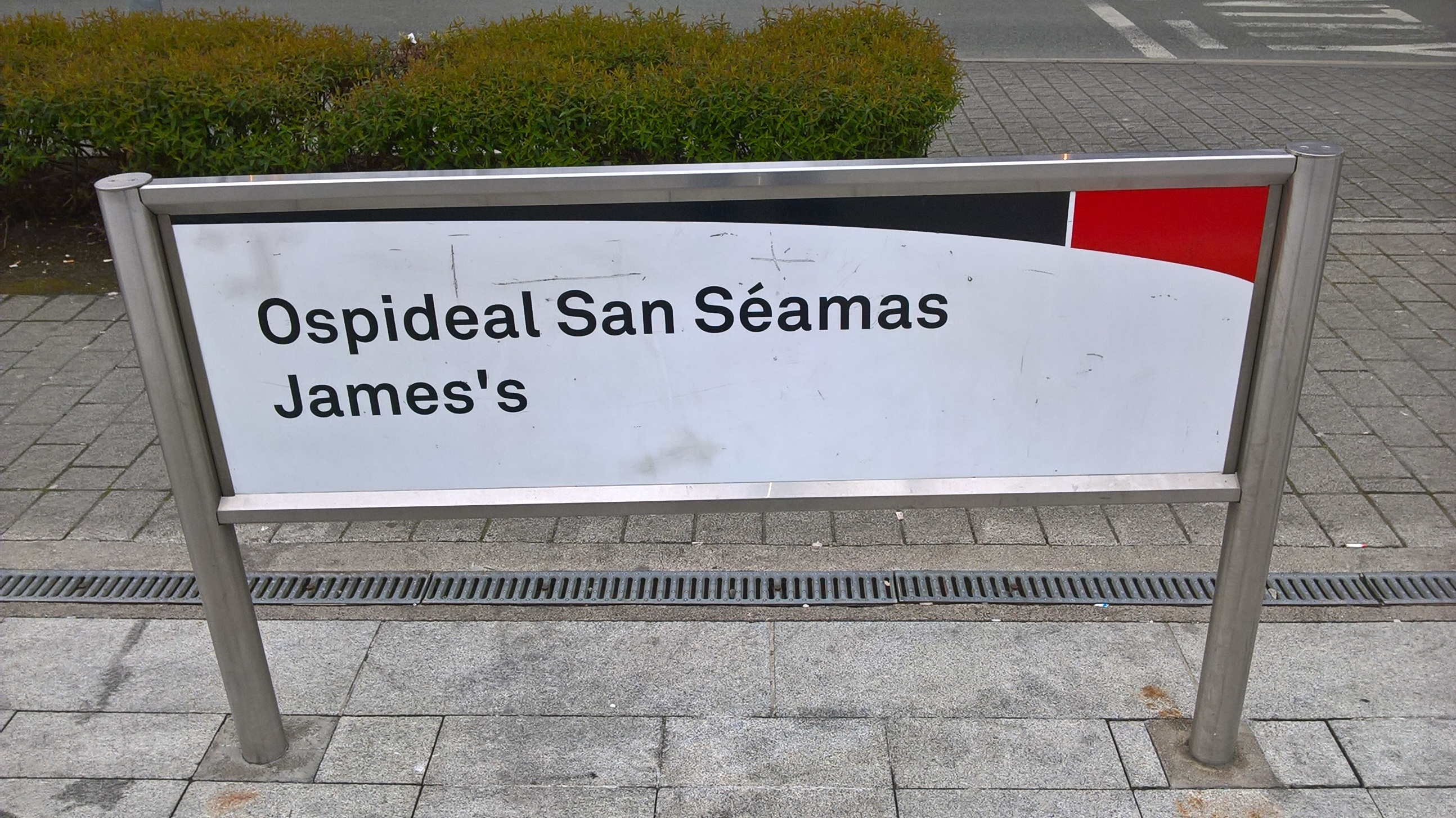 Comhartha ag stáisiún Luas Ospidéal San Séamas, Baile Átha Cliath (2019).